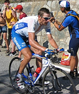 Denis Menchov sur le Tour 2003 (Alpe d'Huez)